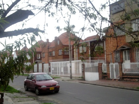 Casas barrio tradicional bogotano Muequeta Cl 63 a la 64 entre carreras 17 a la 24